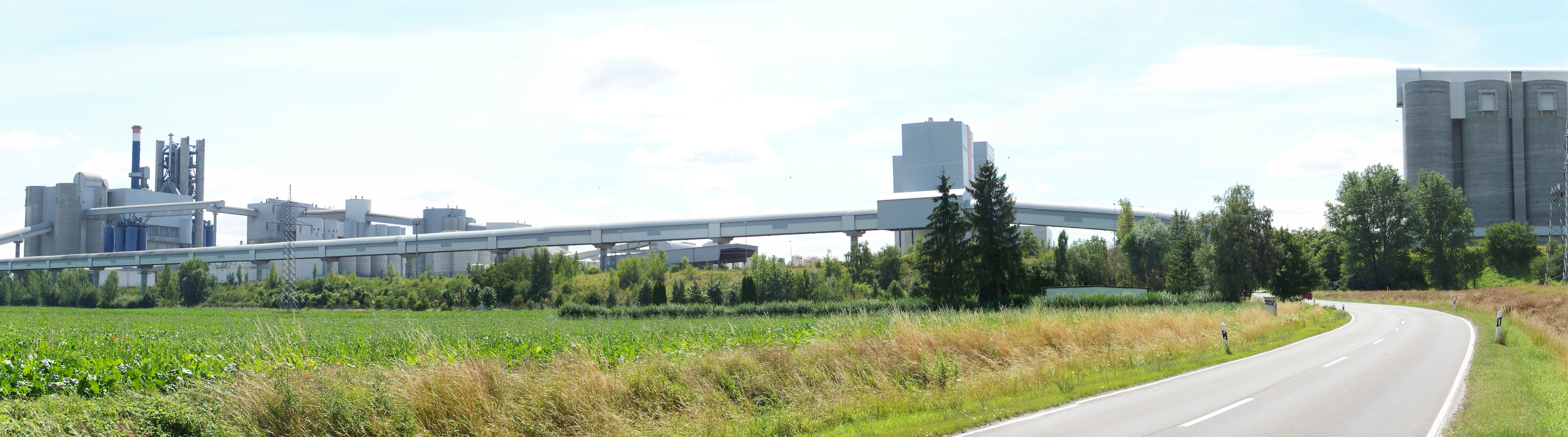 Zementwerk der Firma Schwenk in Bernburg (Saale)